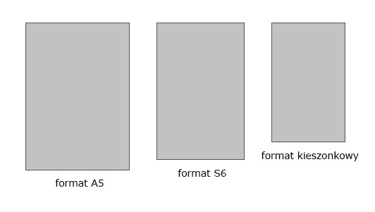 Formaty progresywne – przykłady (2)